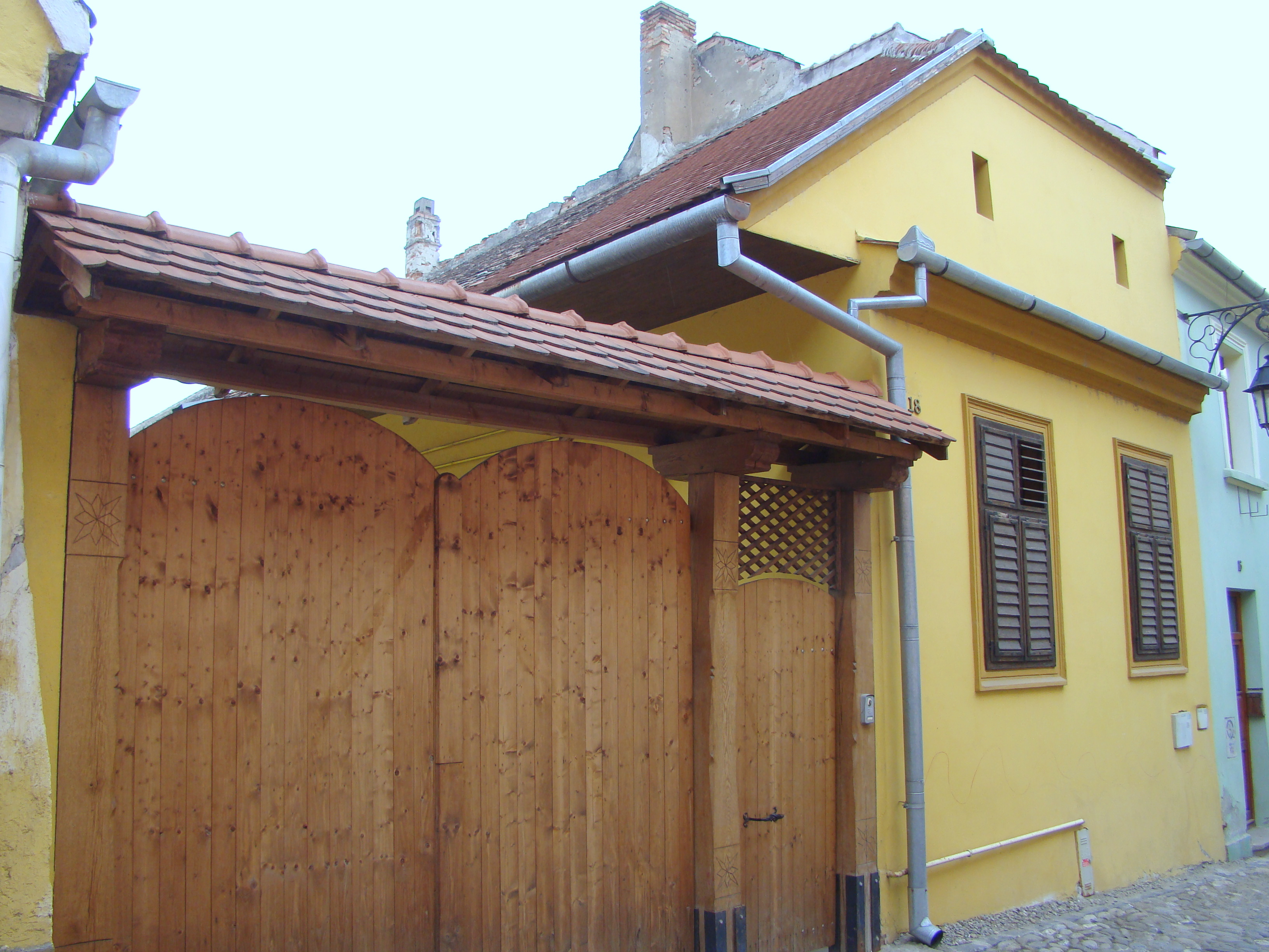 Casa Zatler, municipiul Sighișoara, str. Tâmplarilor 18 sec. XVII,1800 - 1850